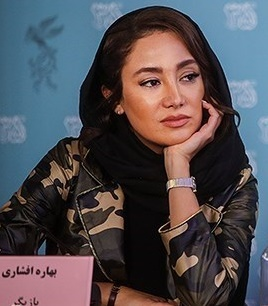 بهاره افشاری در نشست خبری فیلم گشت 2 - سی و پنجمین جشنواره فیلم فجر